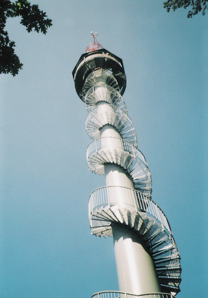 Mírová pod Kozákovem, část Dubecko Telekomunikační převaděč upravený současně počátkem 21. st. jako rozhledna